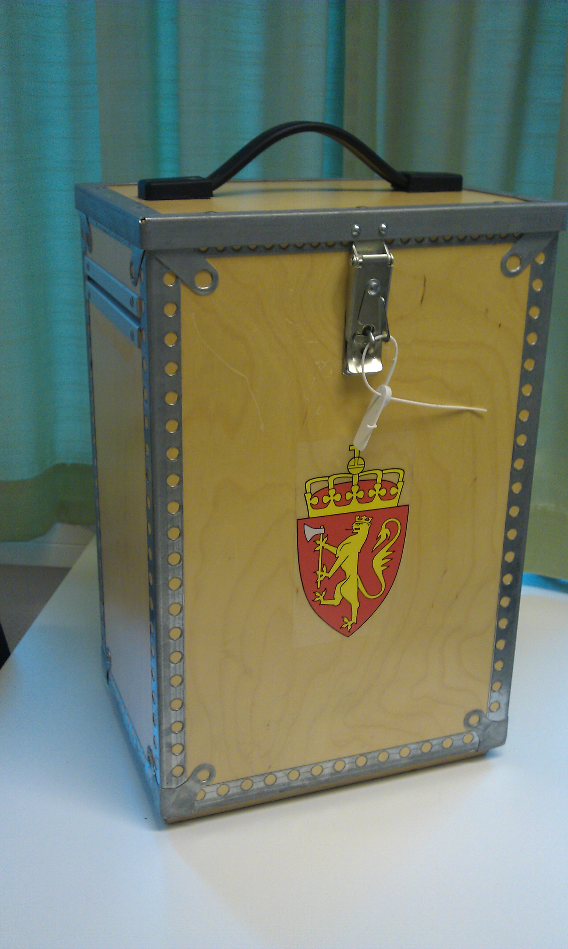 Valurne nytta for kommuneval og fylkesvalet 2011 i Noreg